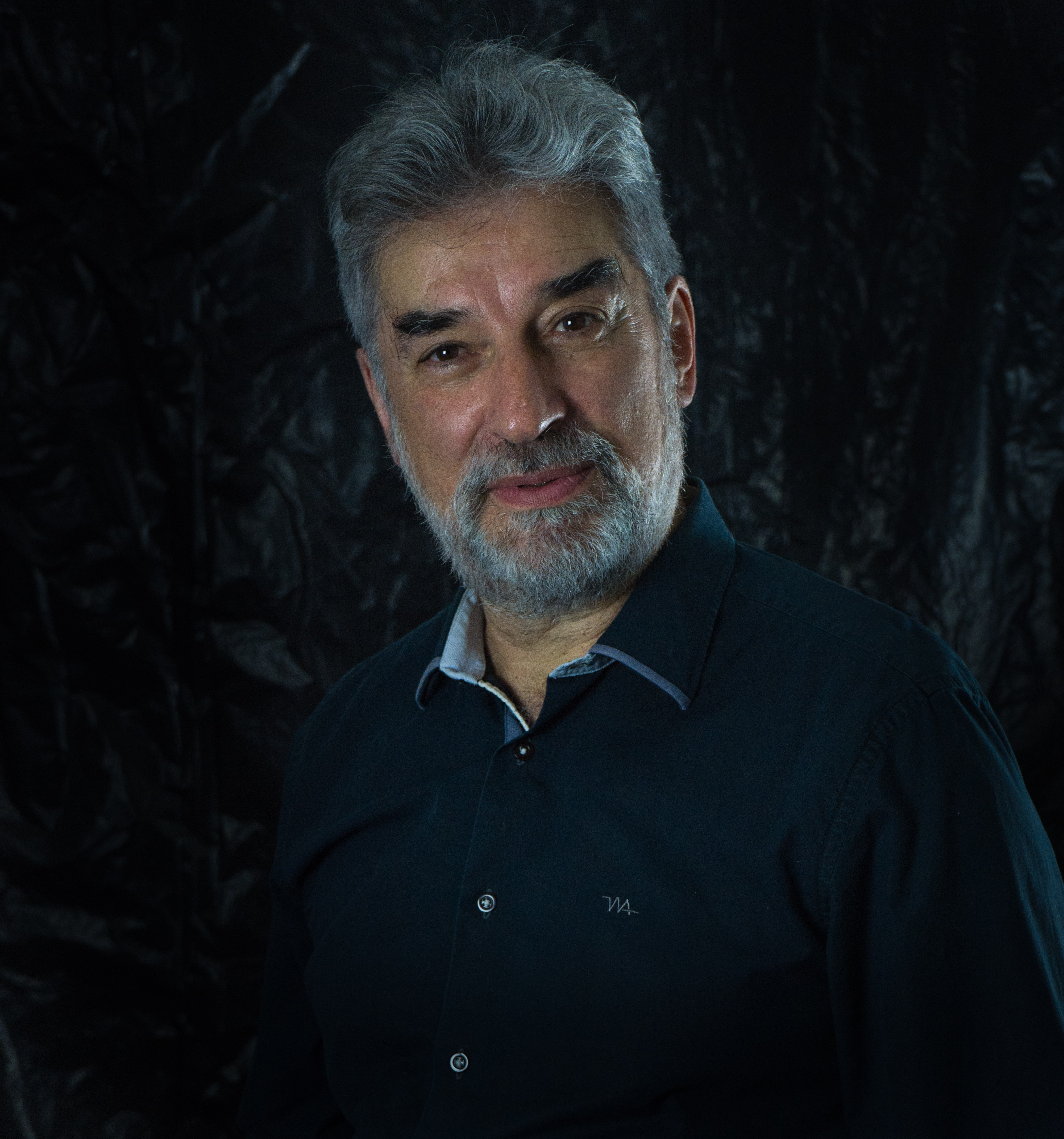 Antonio Carlos Borges-Cunha, compositor e maestro.